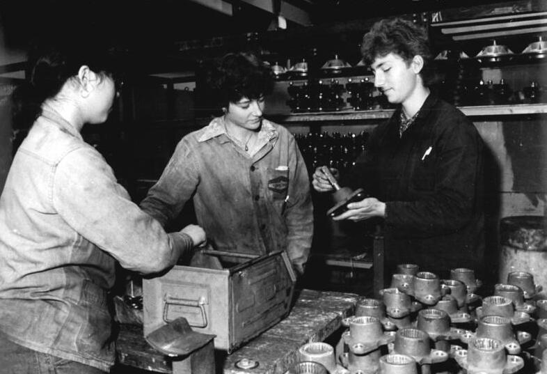 VEB Landmaschinenbau Güstrow, Getriebefertigung ADN-ZB Pätzold-14.6.84 Bez. Schwerin: Jugend-Erlebnisreiche Tage hat Heike Dubba (M.) während des Nationalen Jugendfestivals in Berlin verbracht. Sie ist FDJ-Sekretär des Lehrlingskollektivs im VEB Landmaschinenbau Güstrow. Ihre Lehrlingsnorm konnte sie im Bereich Getriebefertigung mit zwei Prozent überbieten. Dabei erhielt sie von Jungfacharbeitern wie Wolfgang Gubin (r.) so manchen wertvollen Hinweis und Rat.